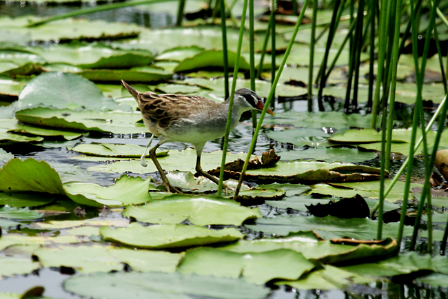 นกอัญชันคิ้วขาว